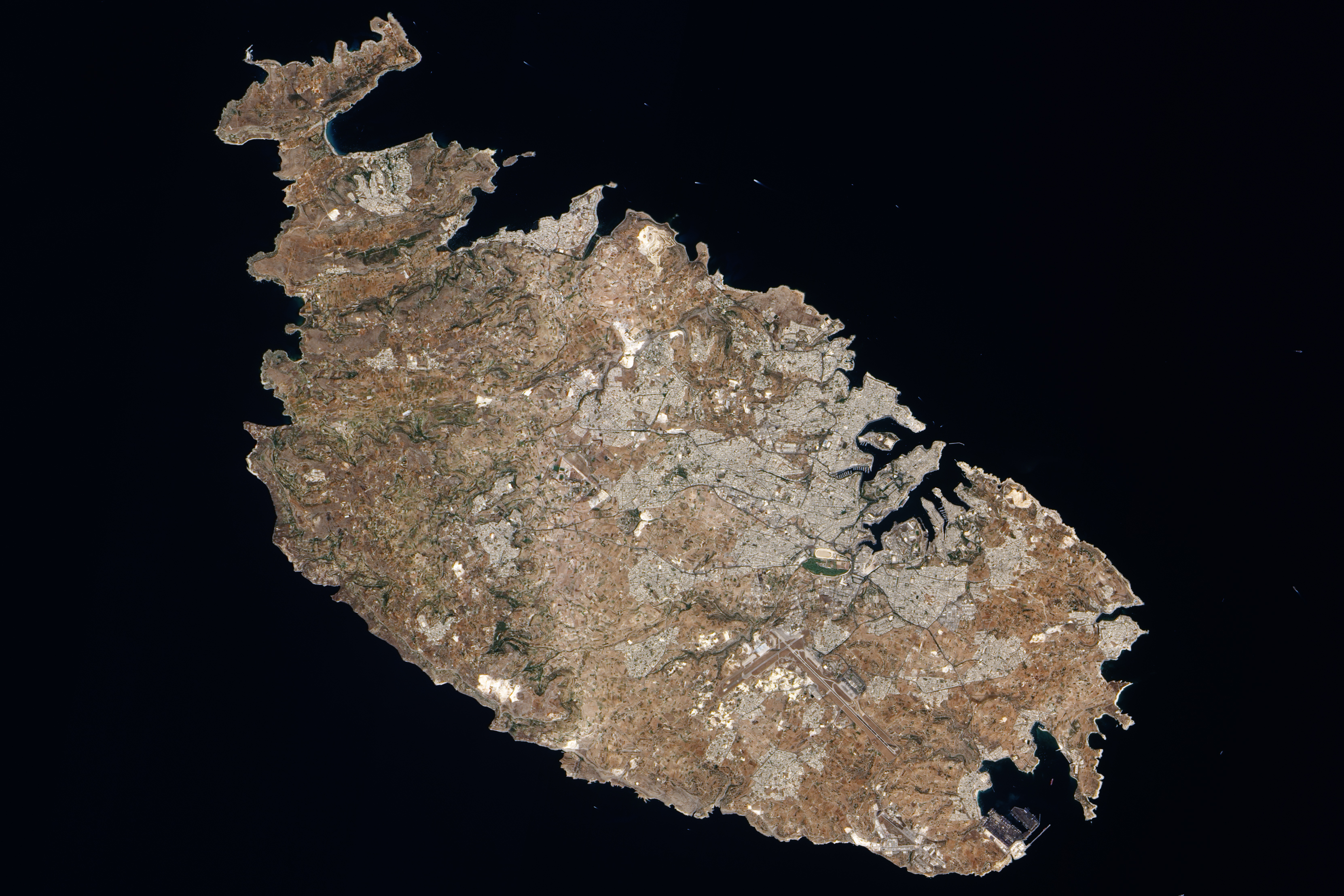 L'île de Malte vue de l'espace.